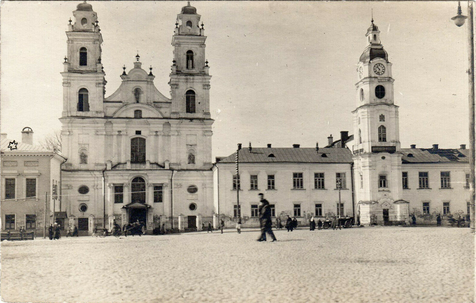 Беларуская (тарашкевіца): Менск (Miensk), пляц Высокі Рынак (plac Vysoki Rynak). Касьцёл Імя Найсьвяцейшай Панны Марыі